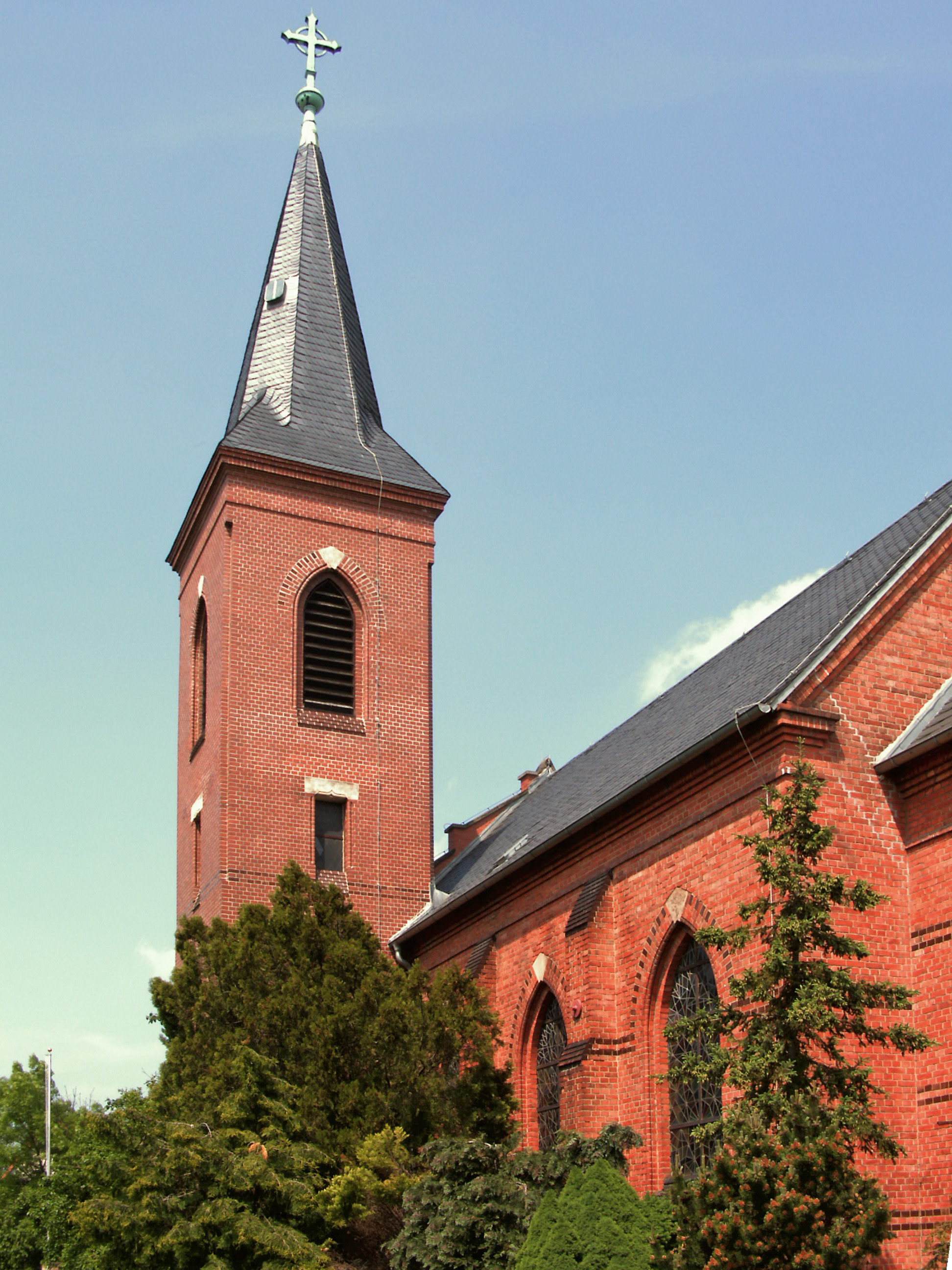 Turm der katholischen Kirche Herz Jesu in Großalsleben, Ortsteil von Gröningen